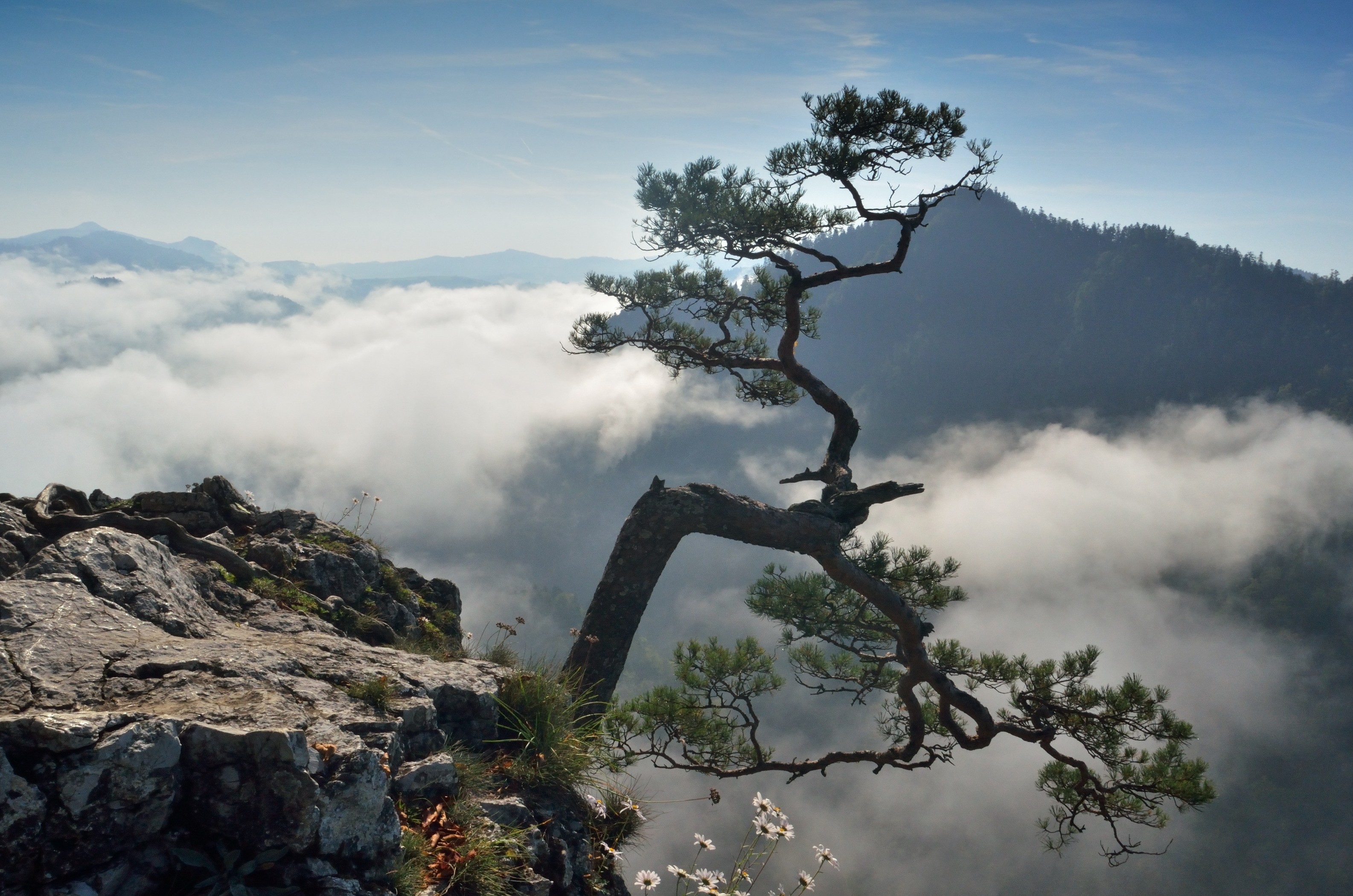 Specjalny obszar ochrony siedlisk Pieniny. This is a photography of Natura 2000 protected area with ID PLC120002